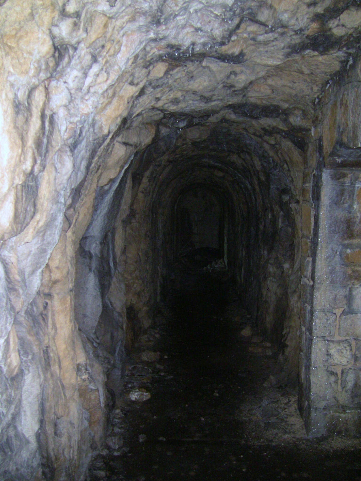 Couloir principal du magasin annexe du fort de Planoise (permettant de joindre les deux entrées), à Besançon (Doubs, France).